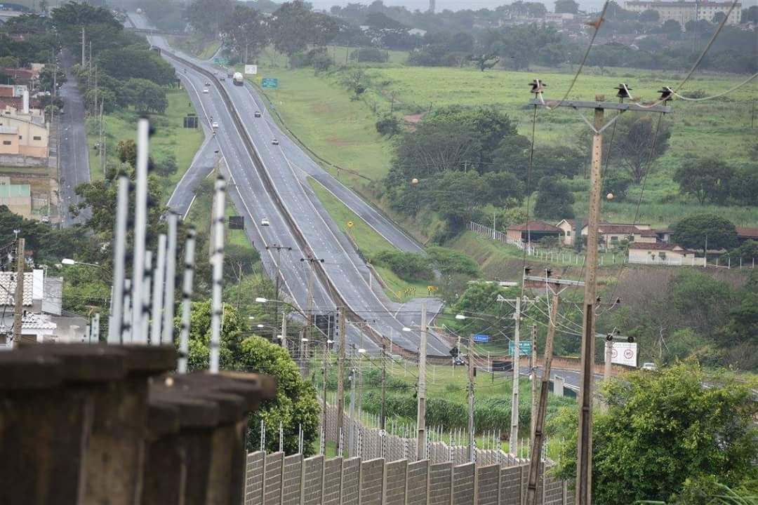 Rodovia Cesário Jose de Castilho em Catanduva